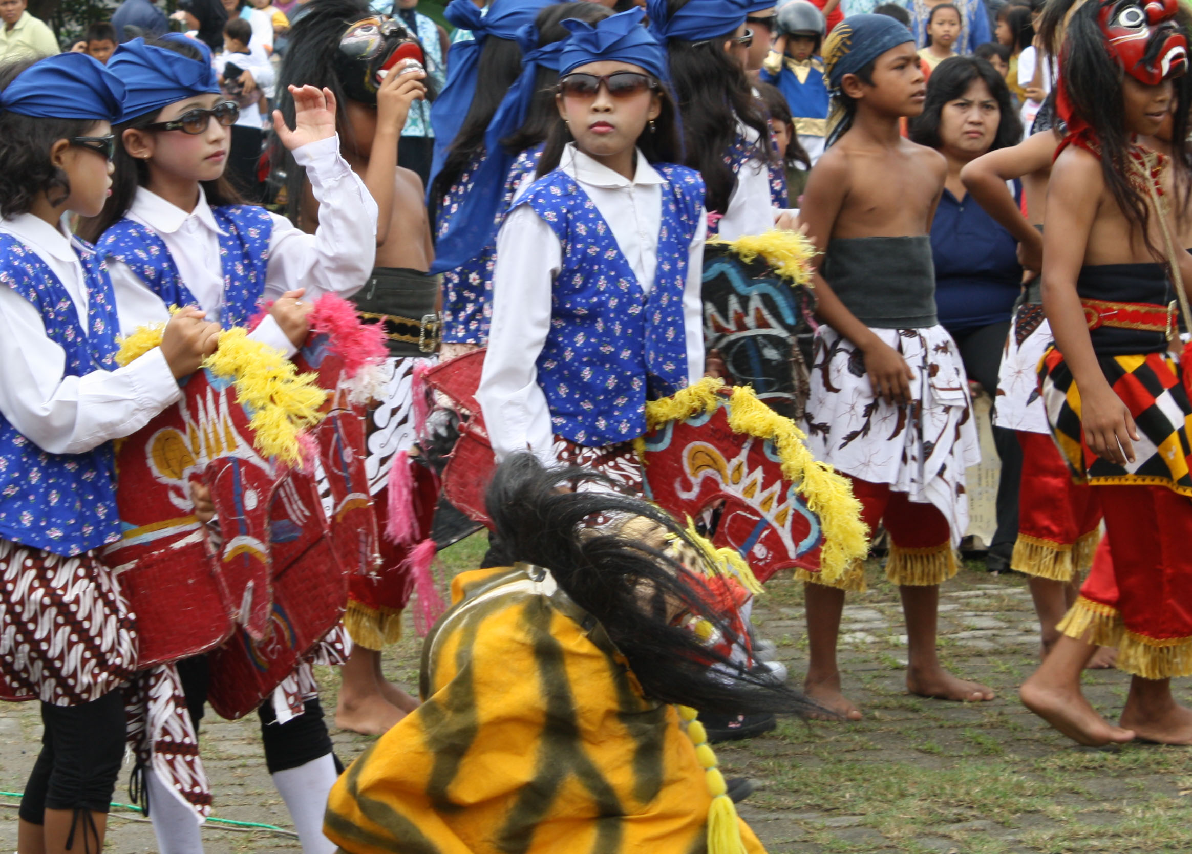 Jaran dor di dalam pasukan barongan